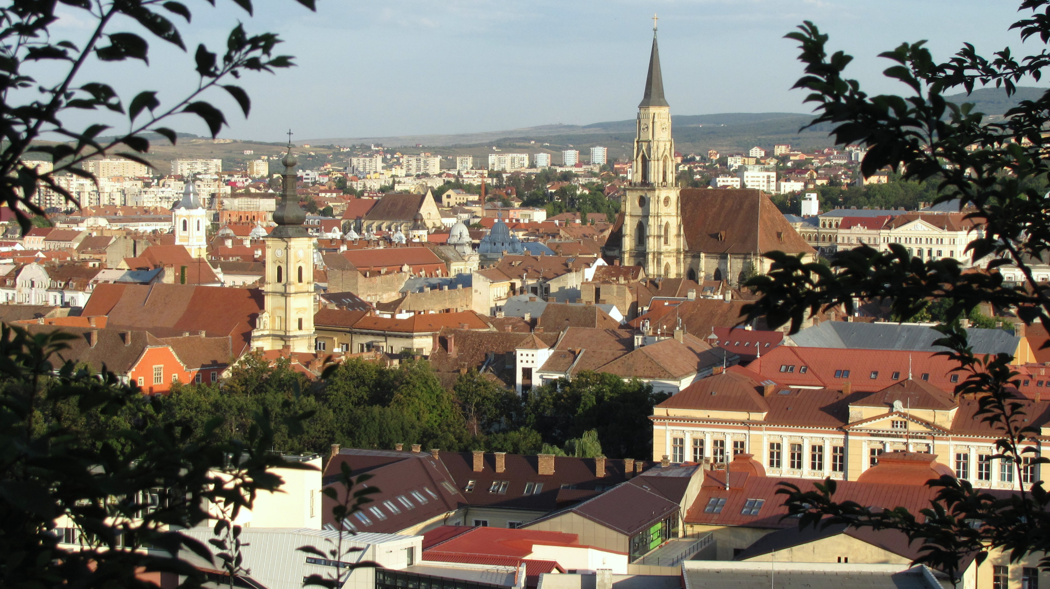 Cluj-Napoca - vedere de pe Cetățuia